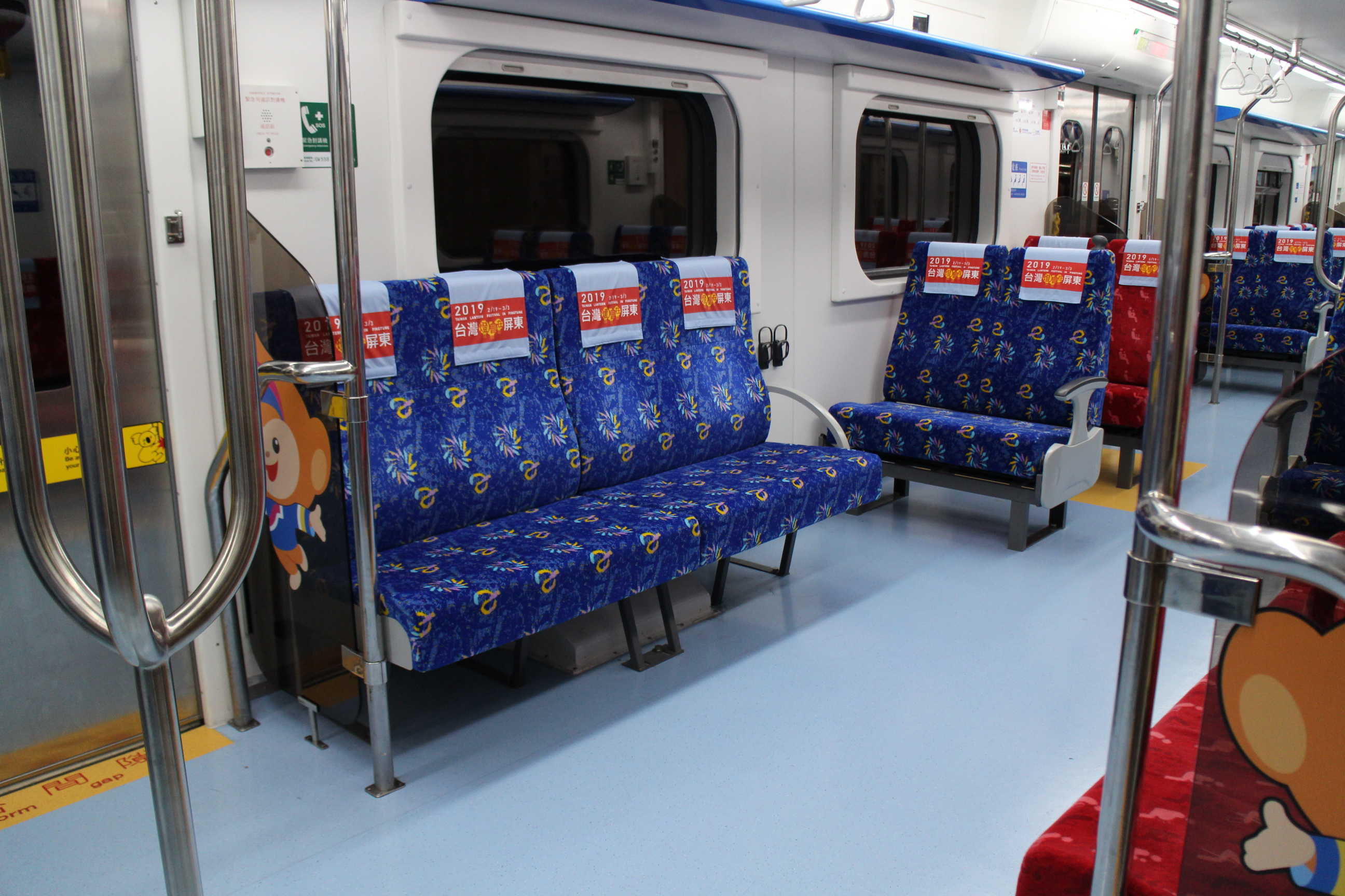 台湾鉄路管理局EMU500形電車 屏東仕様 座席